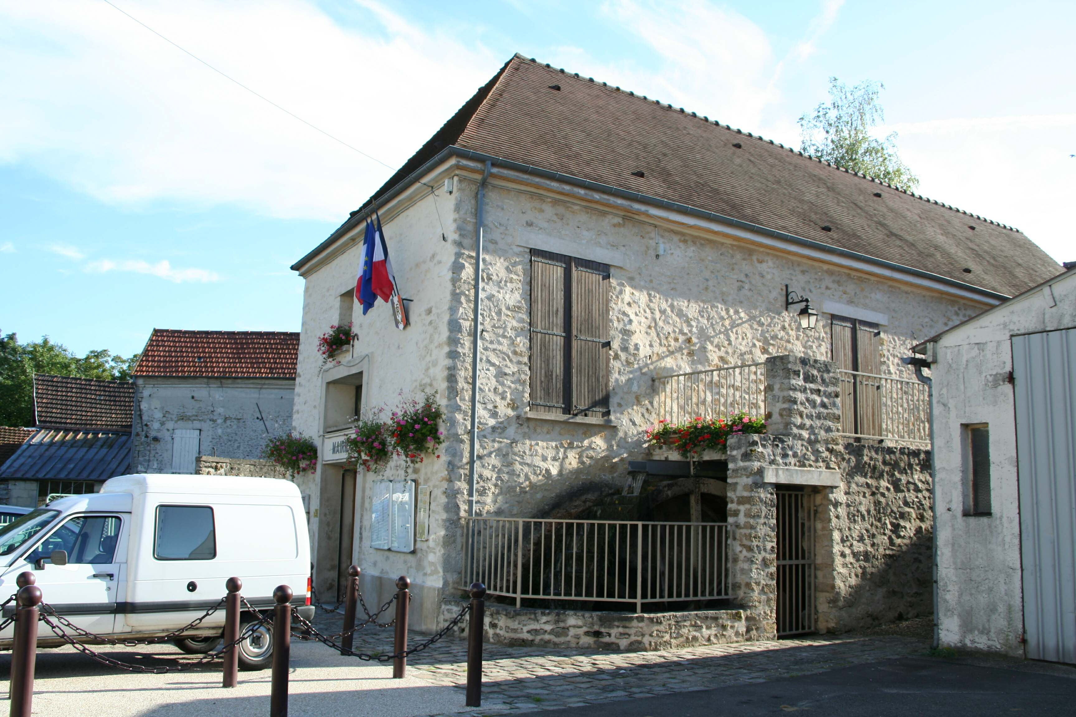 Mairie de Montalet-le-Bois - Yvelines (France)